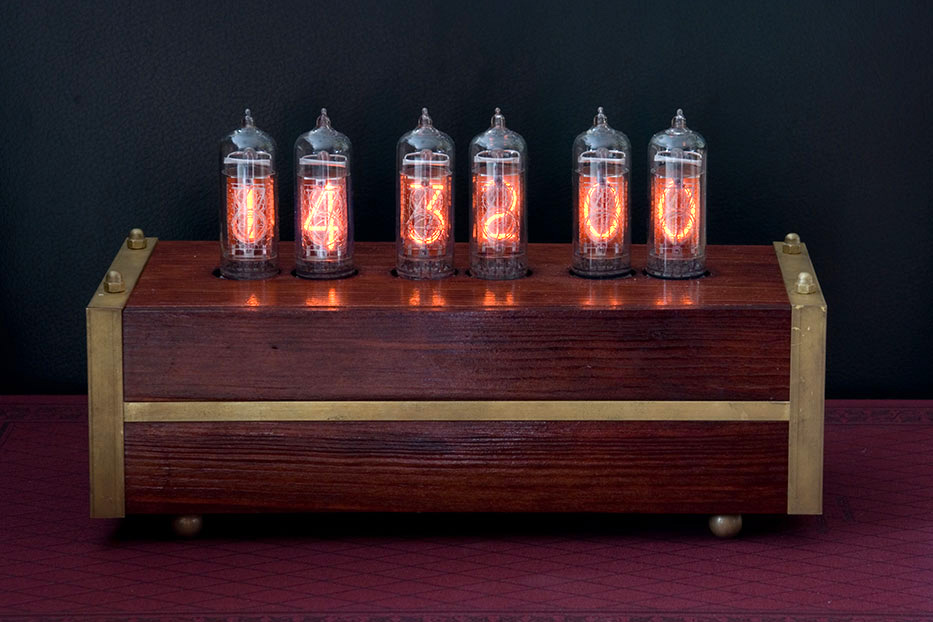 Nixie Clock